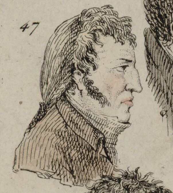 Pierre Guillemot (1759-1805)